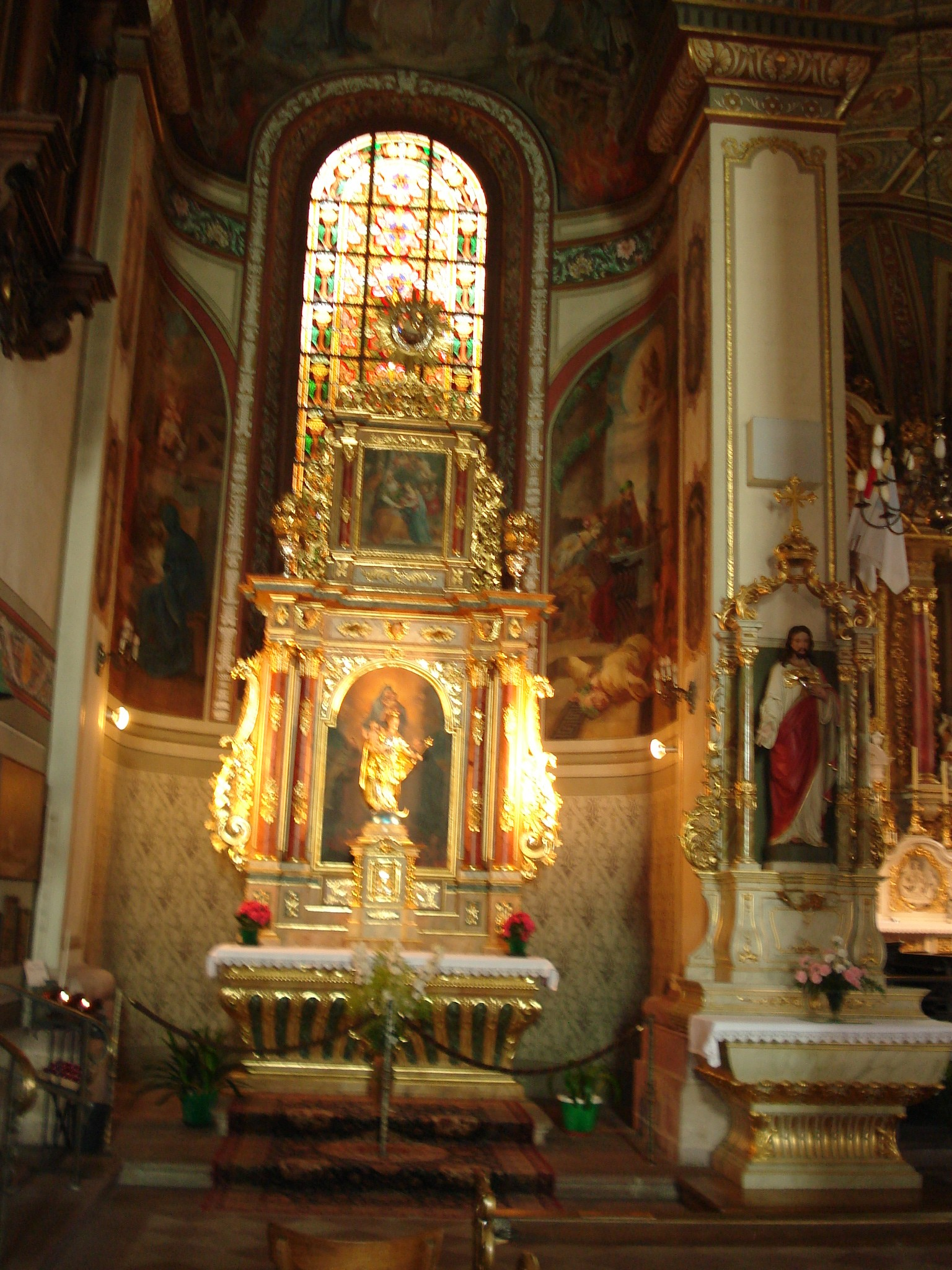 Thierenbach : Autel et décor de l'abside sud